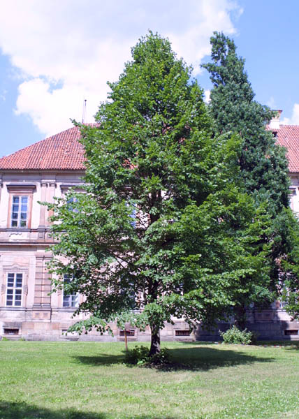 Kongresovka u plaského kláštera.